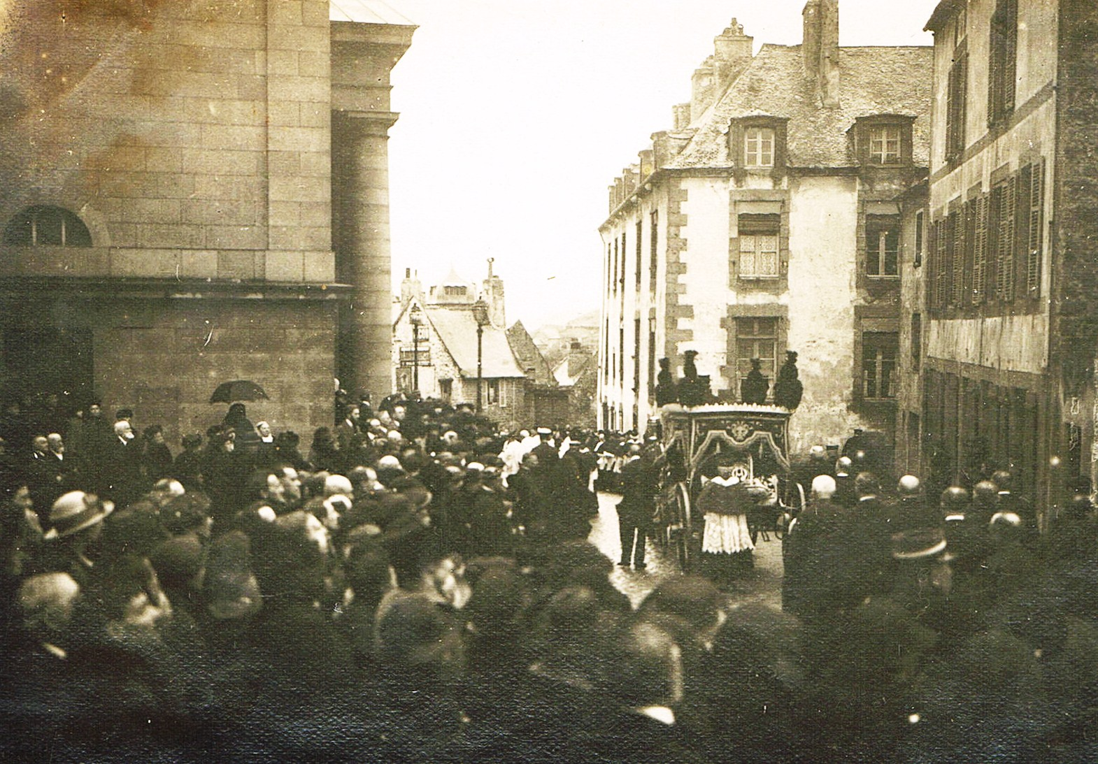 La foule aux obsèques de l'académicien Louis Duchesne le 2 mai 1922 à Saint-Servan-sur-Mer, aujourd'hui Saint-Malo. En l'occurrence, la sortie de l'église Sainte-Croix.